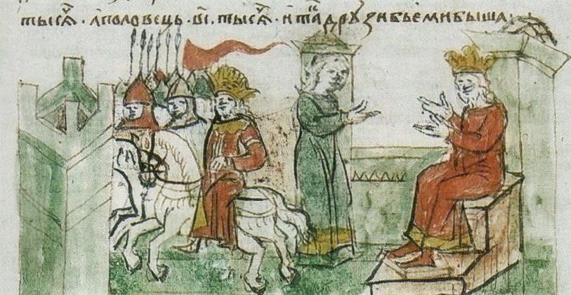 Беларуская (тарашкевіца): Мініятура Радзівілаўскага летапісу: Усяслаў Чарадзей на вялікакняскім кіеўскім пасадзе